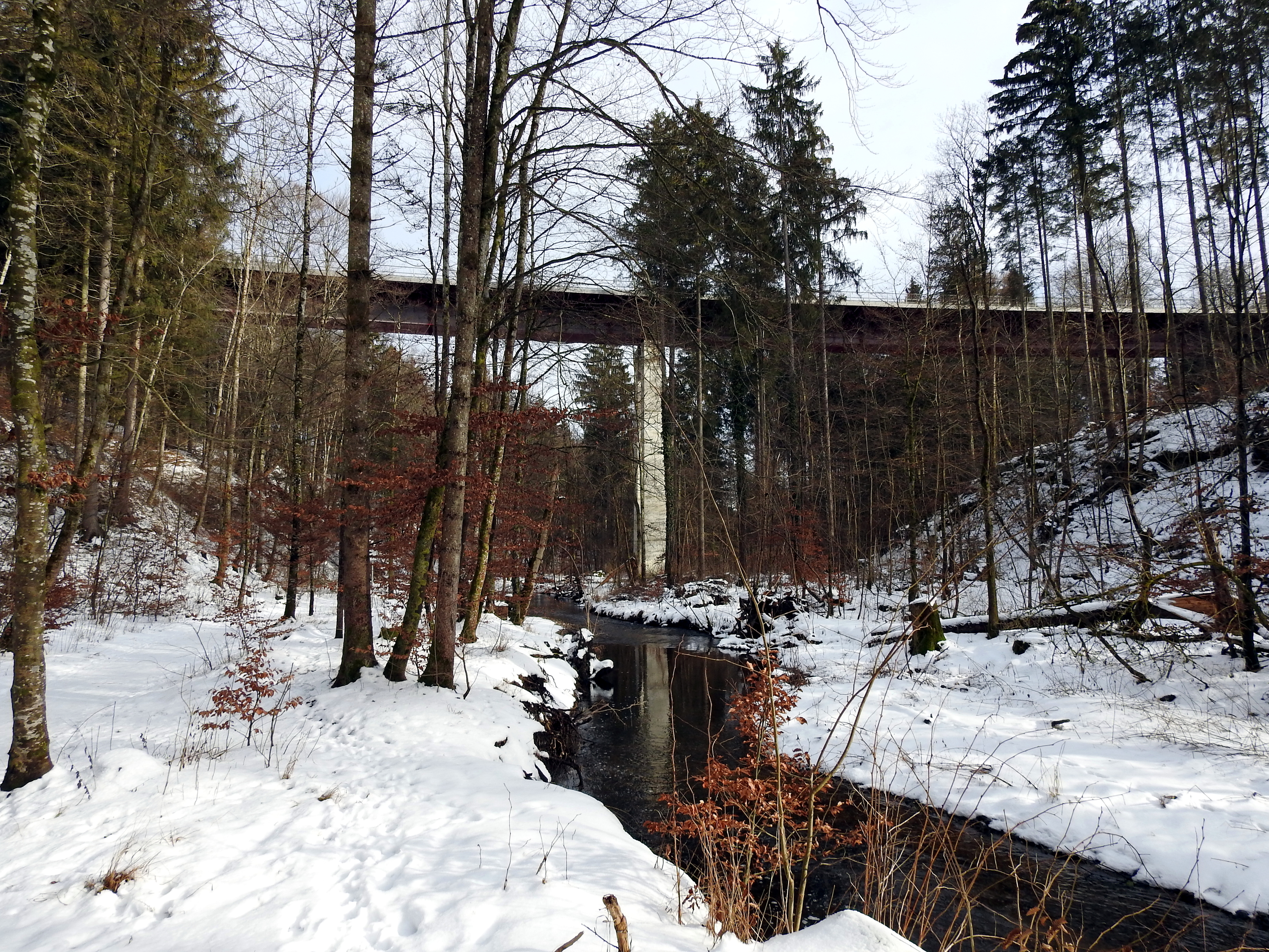 Brücke der St 2563 über die Maisinger Schlucht.